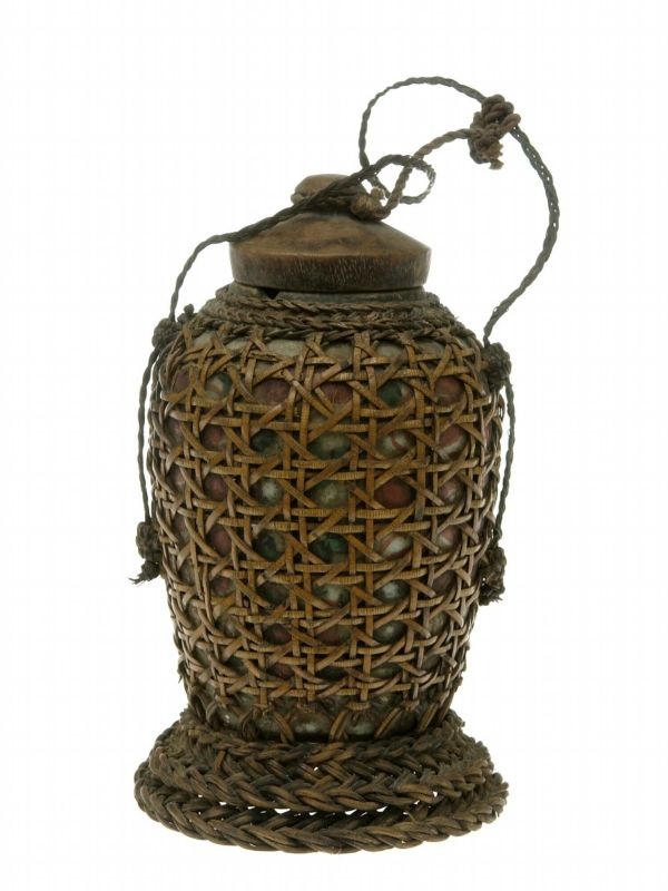 Medicijnhouder. Houder voor de opslag van pupuk. Pupuk is een tovermiddel dat afweerbeelden, beschermbeelden en toverstaven een magische kracht geeft. Priester-genezers die in het bezit waren van pupuk hadden meerdere houders om pupuk in te bewaren, zoals potjes van hout, porselein of lood en uitgeholde hoorns van een waterbuffel of van een berggeit. De houders waren vaak rijk versierd met uitgesneden mens- en dierfiguren. Pupuk verkreeg de datu door een uit een naburig dorp ontvoerd kind in te graven tot het hoofd. Nadat het kind had gezworen zich in te zetten voor het welzijn van het dorp, goot de datu vloeibaar lood in de mond van het kind. Op deze wijze wist de datu de geest van het kind voor zich te laten werken. Uit het lichaam van het dode kind werd de pupuk gemaakt (Sibeth 1991: 136, 138).. Pot voor de opslag van een tovermiddel